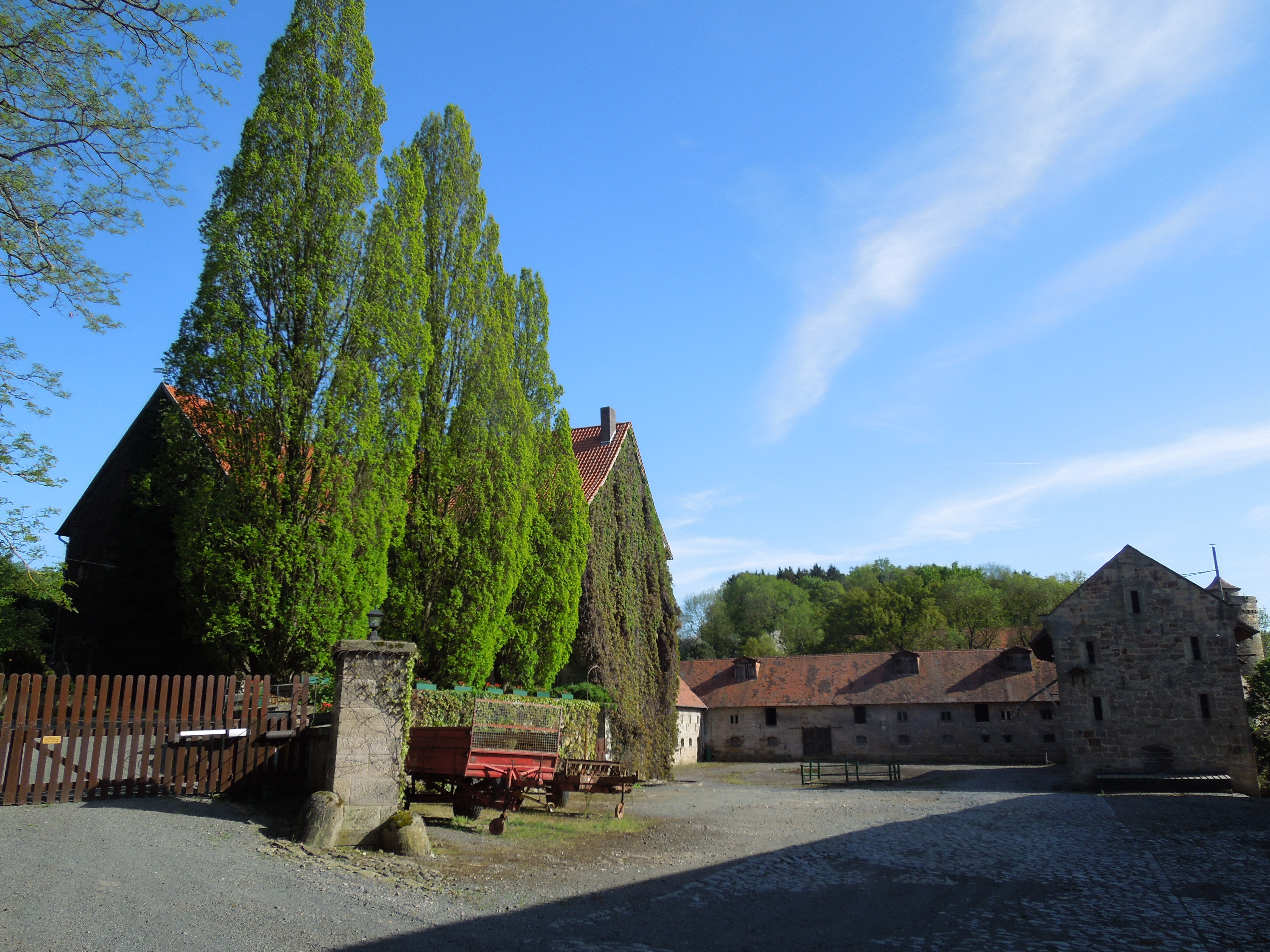 Züschen: ehem. Schloss (links) und Gutshof der Meysenbug und Garvens